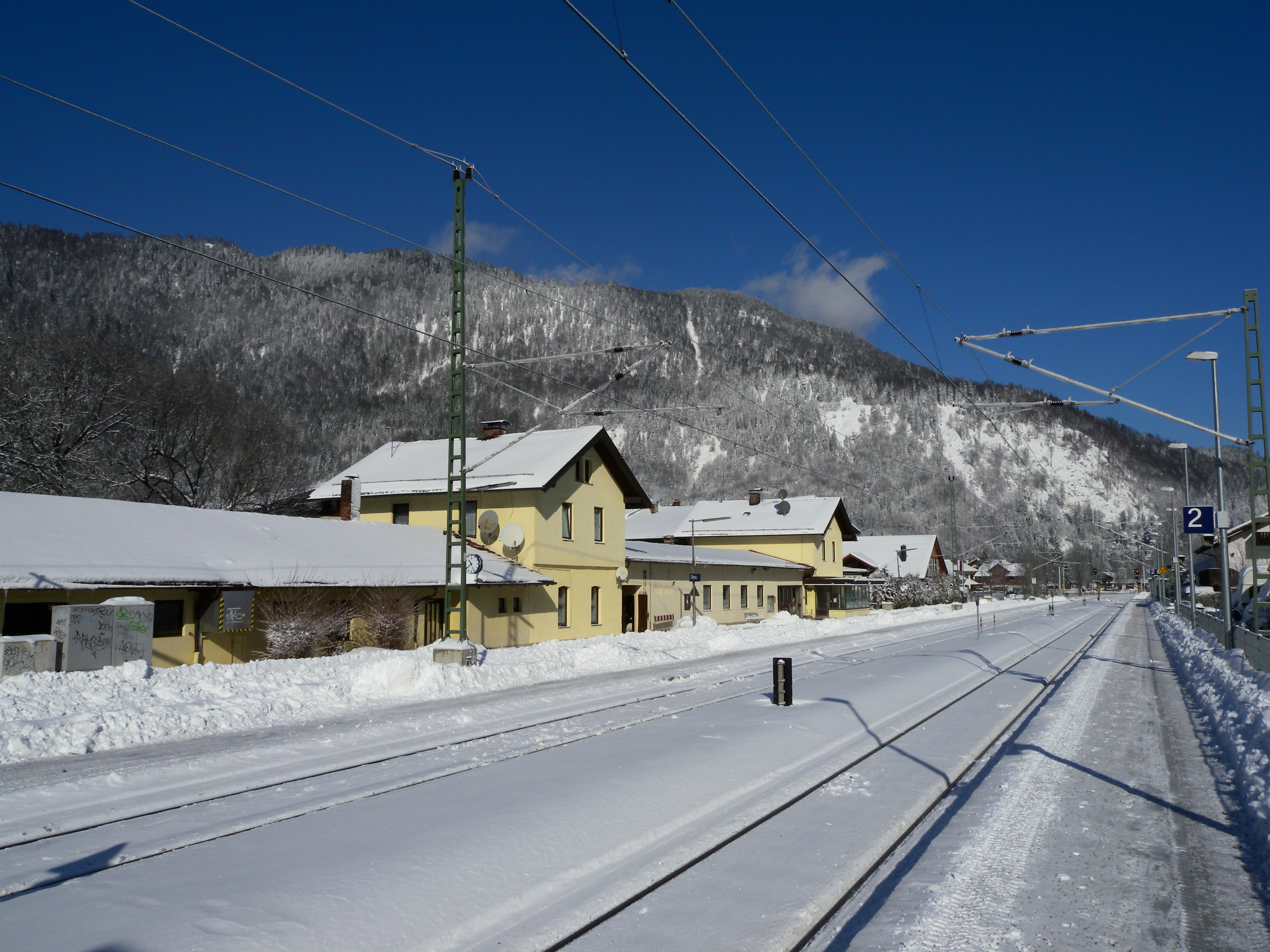 Der Bahnhof Oberau, Blick in Richtung Norden.